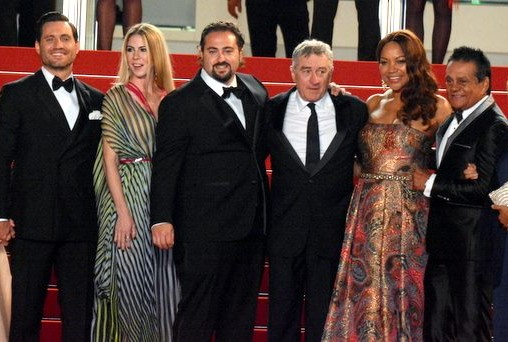 Présentation du film "Hands of stone" au festival de Cannes. Édgar Ramírez, Claudine Jakubowicz, Jonathan Jakubowicz, Roberto De Niro, Grace Hightower, Roberto Duran .